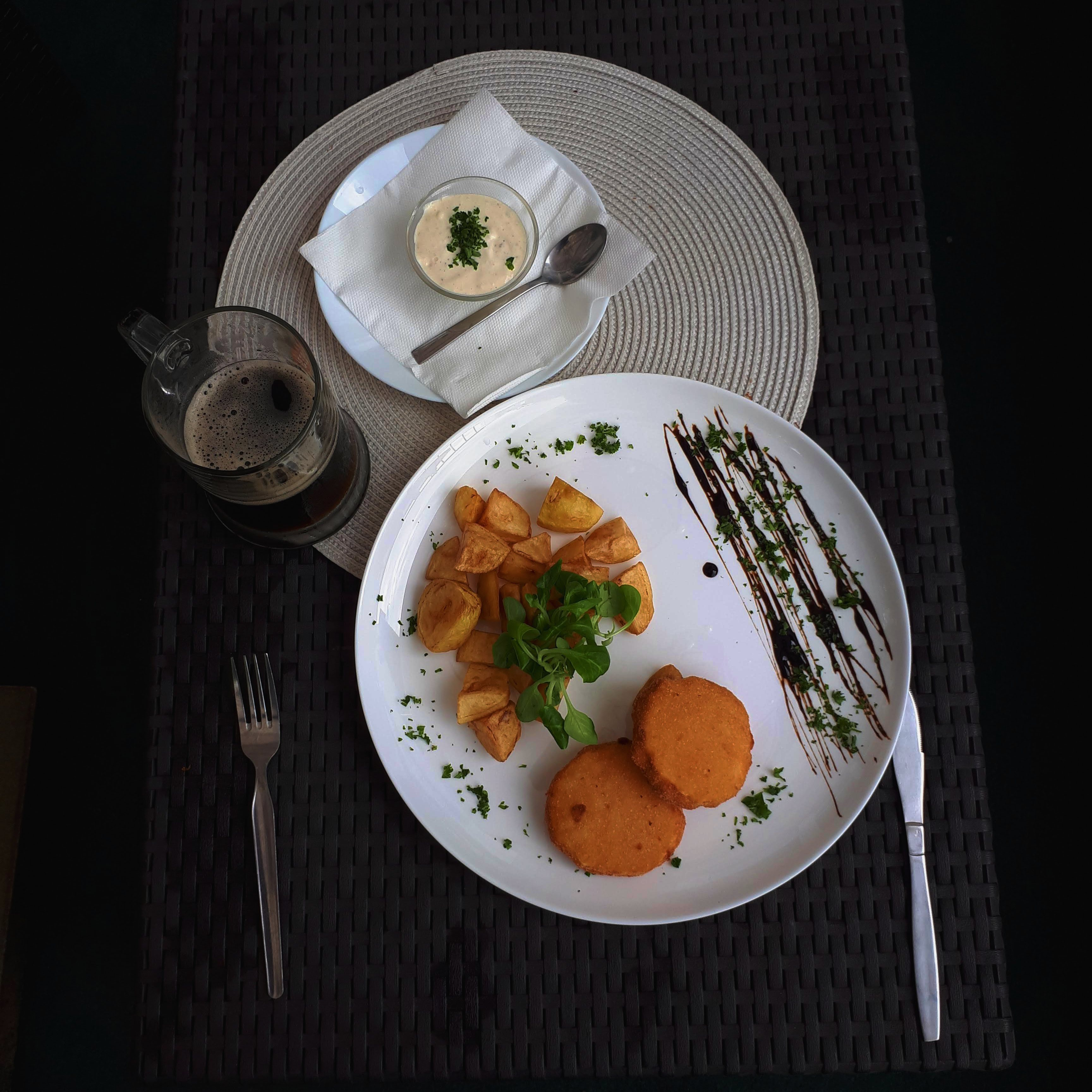 Smažený sýr s neobvyklým designem